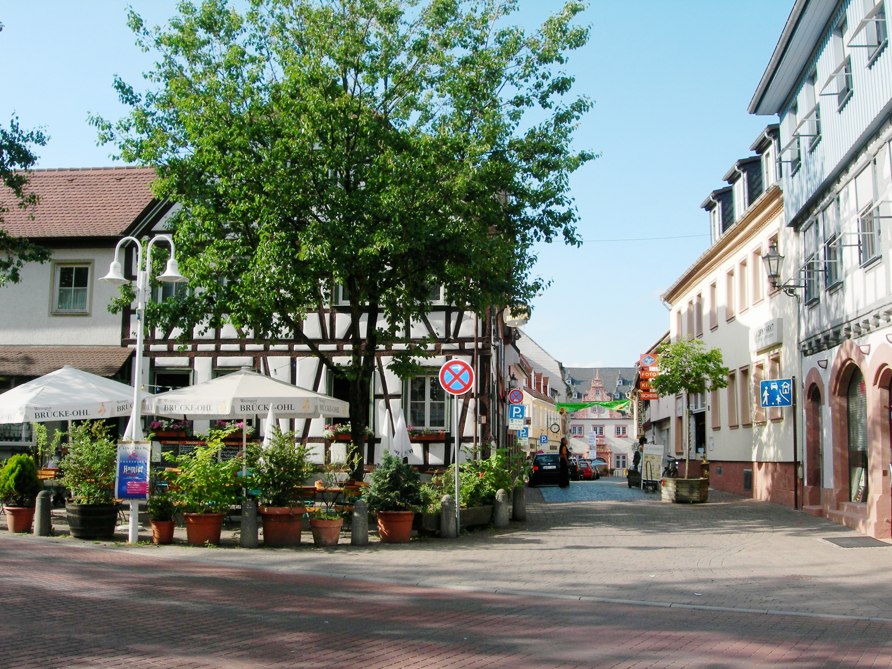 Priskribo